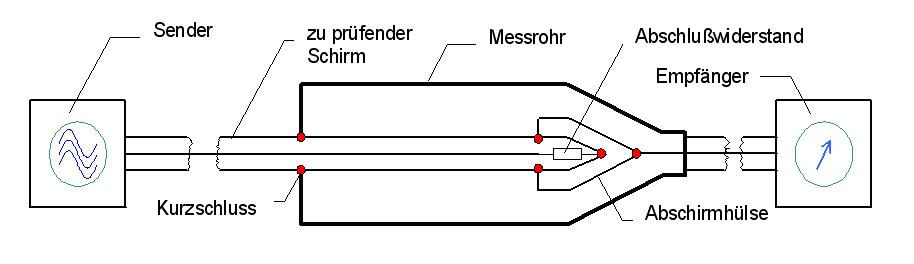 Triaxialverfahren